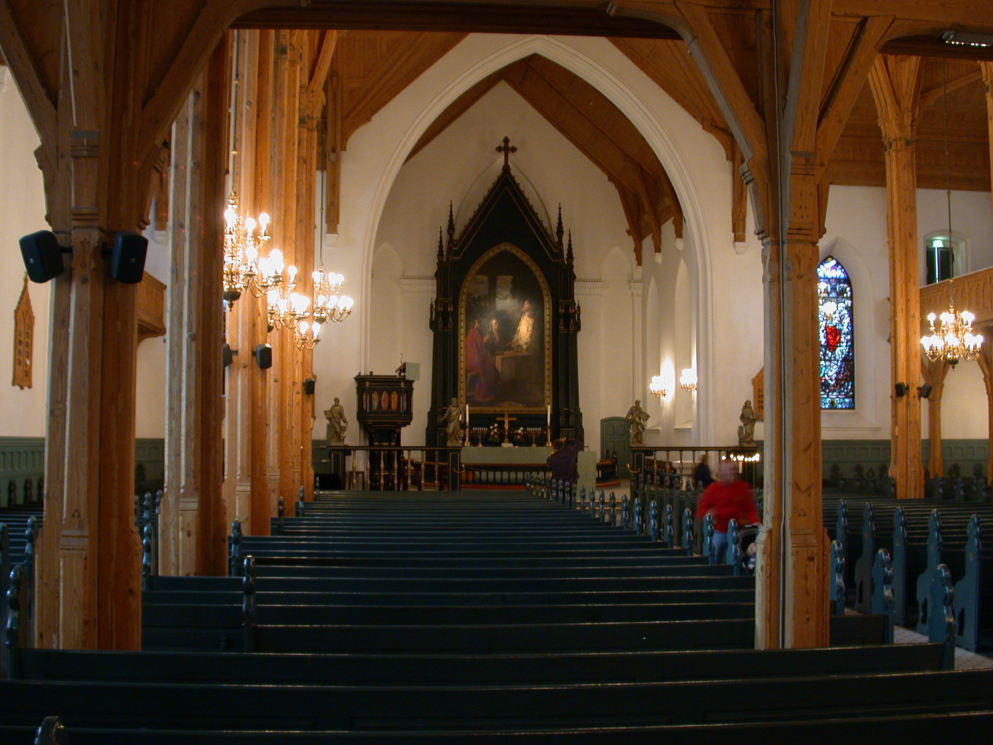 Interiør Kristiansand domkyrkje